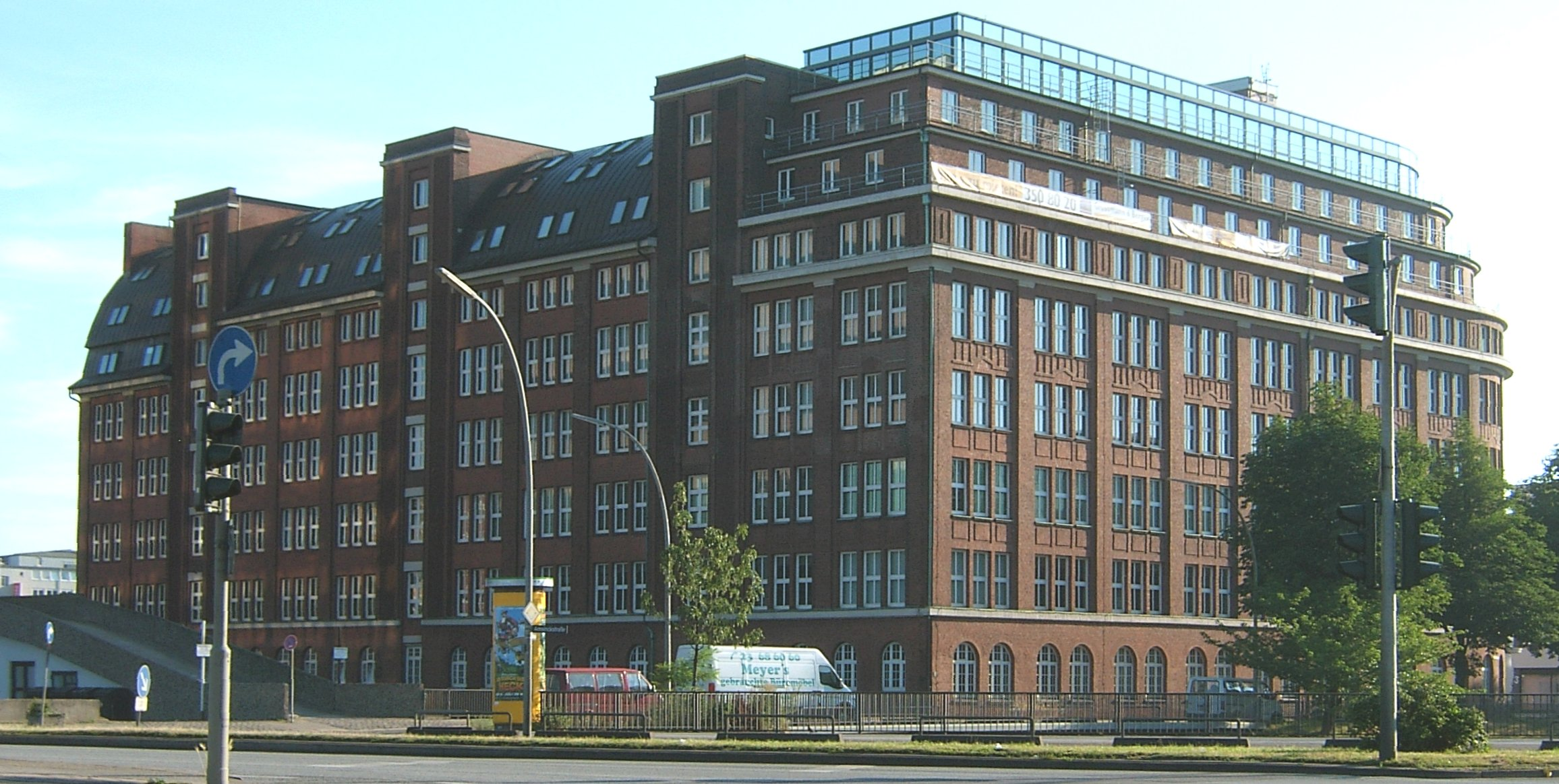 Hamburg, Hammerbrook, ehemalige Fabrik der GEG; erbaut 1911-14 als Zentrallager, ab 1927 als Schokoladen- und Süßwarenfabrik genutzt, heute umgebaut zum Kontorhaus "Sonninhof"